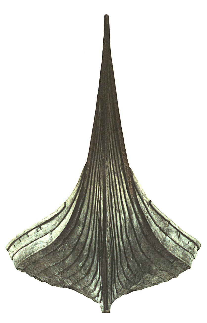 Vista de frente – Una de las más notables muestras de arte nórdico así como de la construcción de barcos